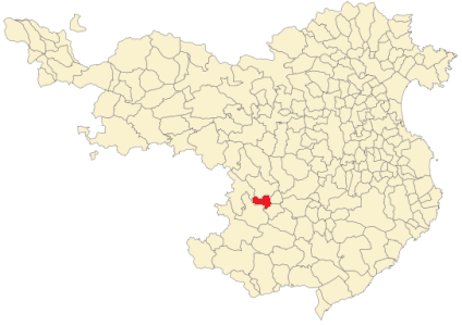 Situación de La Cellera de Ter en la provincia de Gerona.